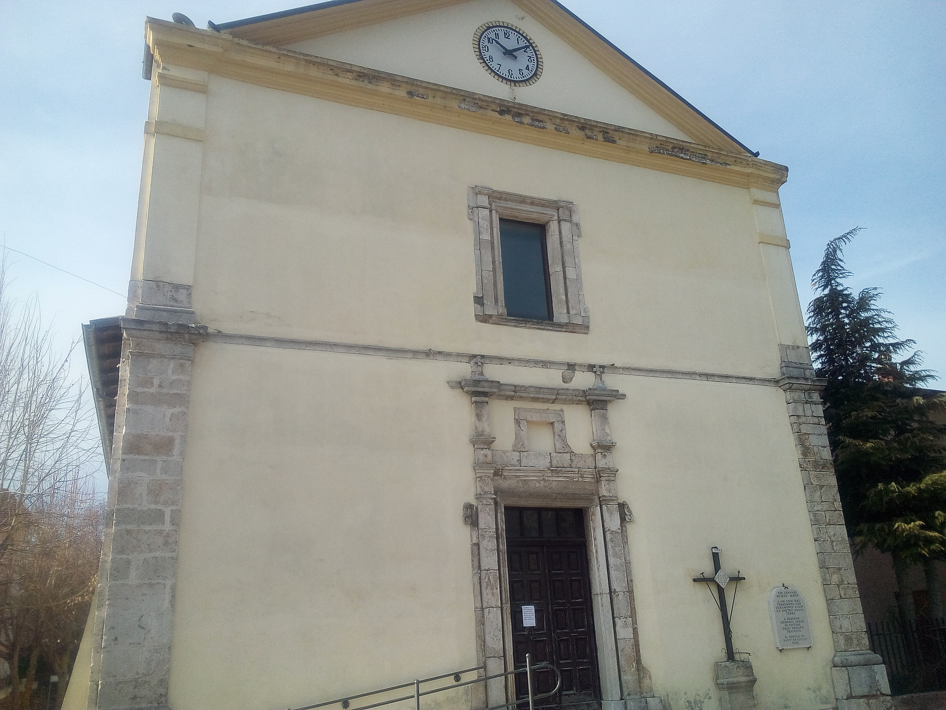 Facciata della chiesa di San Nicola